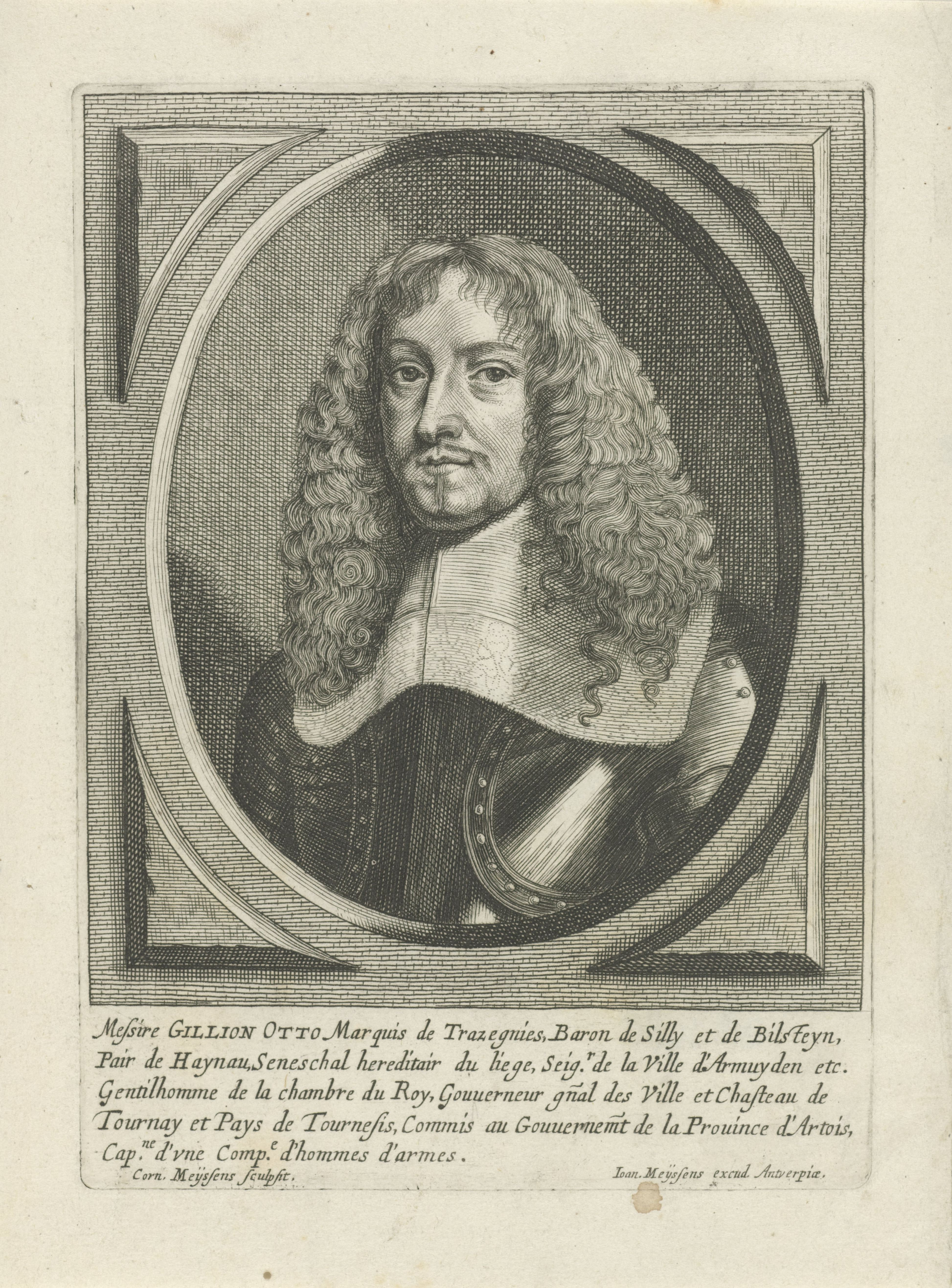 IdentificatieTitel(s): Portret van Gillion-Othon I de TrazegniesObjecttype: prent Objectnummer: RP-P-1908-2485Opschriften / Merken: verzamelaarsmerk, verso, gestempeld: Lugt 2228Omschrijving: Portret van Gillion-Othon I de Trazegnies, markies van Trazegnies. Onderaan in de marge zijn titels en functies in het Frans.VervaardigingVervaardiger: prentmaker: Cornelis Meyssens (vermeld op object)uitgever: Joannes Meyssens (vermeld op object)Plaats vervaardiging: AntwerpenDatering: 1650 - 1670Fysieke kenmerken: gravureMateriaal: papier Techniek: graveren (drukprocedé)Afmetingen: plaatrand: h 174 mm × b 126 mmOnderwerpWie: Gillion-Othon I de TrazegniesVerwerving en rechtenVerwerving: aankoop 1908Copyright: Publiek domein